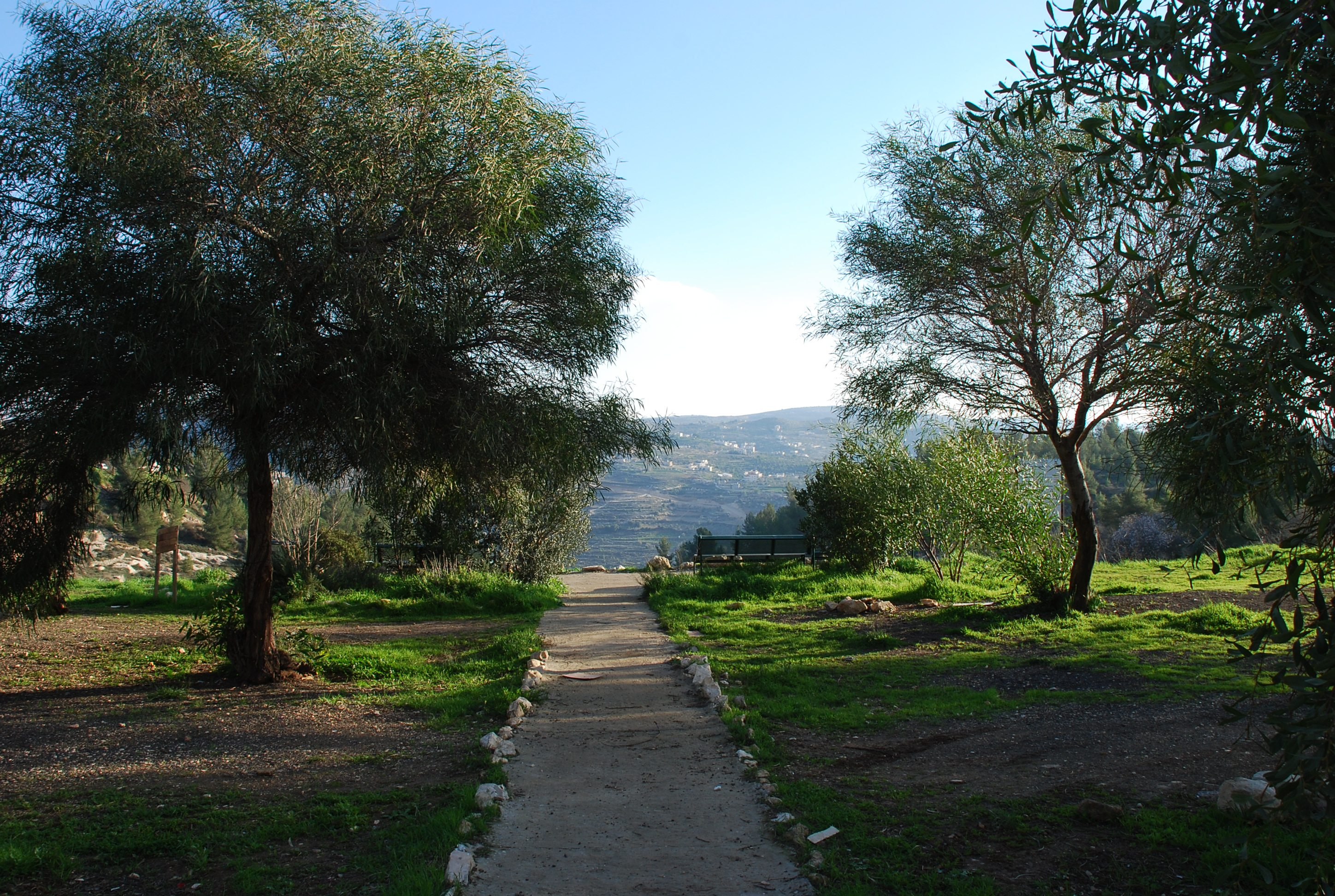 Panama St. Jerusalem